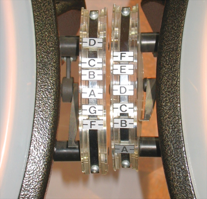 Ce sont les cadrans sur lesquels le timbalier règle la note qu'il joue